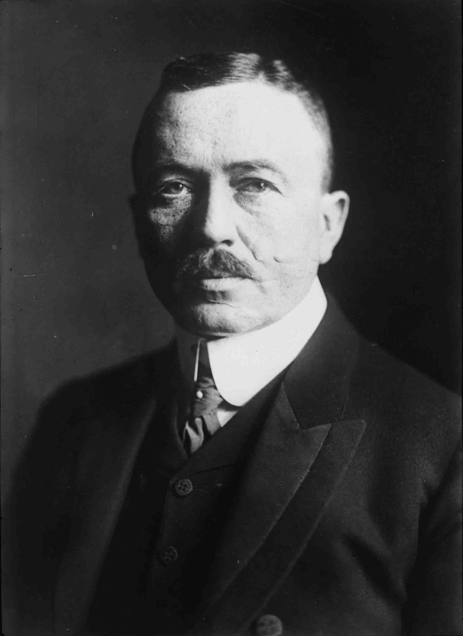 Dr. jur. Otto Gleim (1866-1929), Gouverneur von Kamerun, Format Bildträger: 9x12